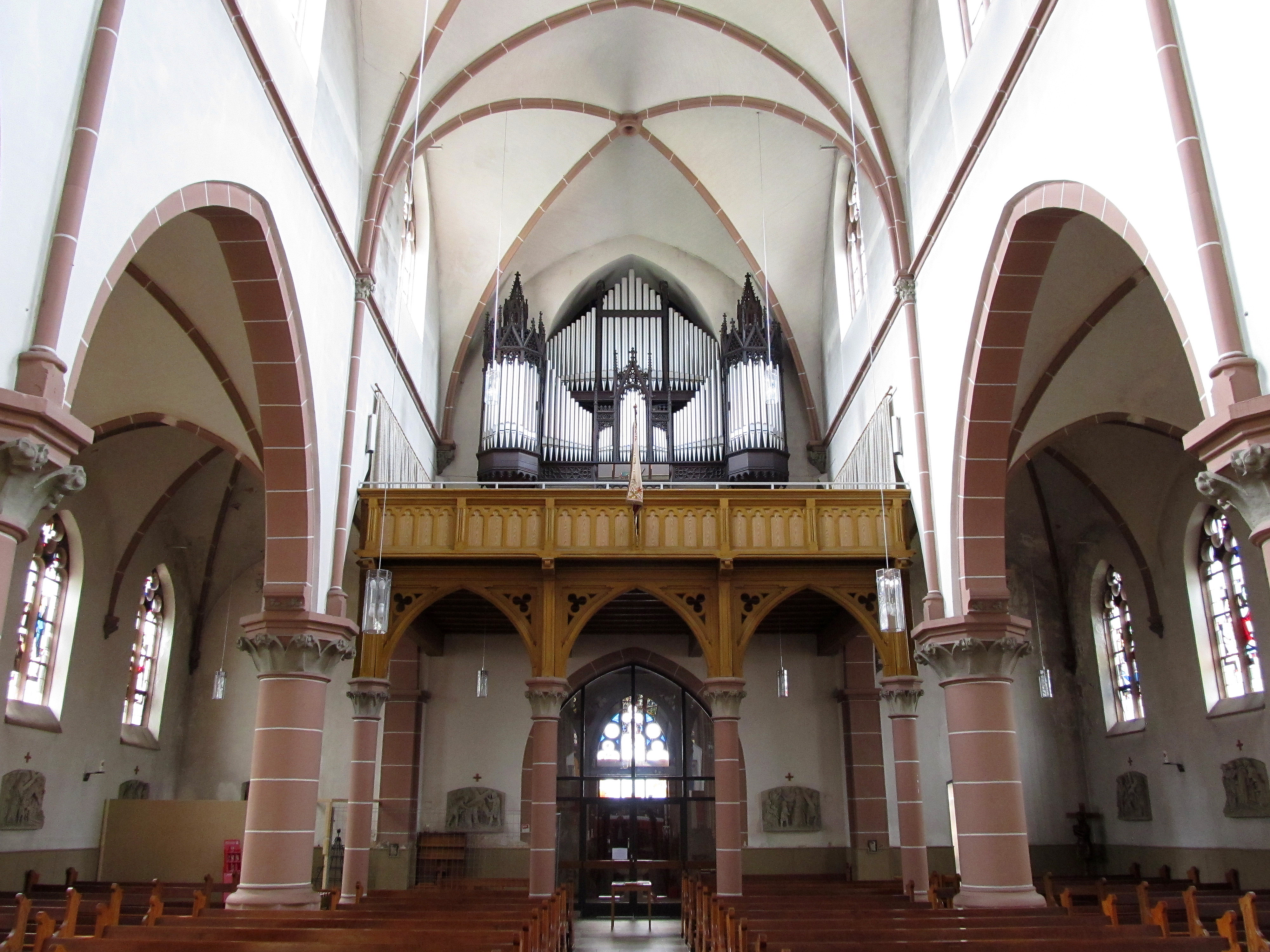 Blick ins Innere der katholischen Pfarrkirche Herz Jesu in Landsweiler-Reden, einem Ortsteil der Gemeinde Schiffweiler, Landkreis Neunkirchen, Saarland